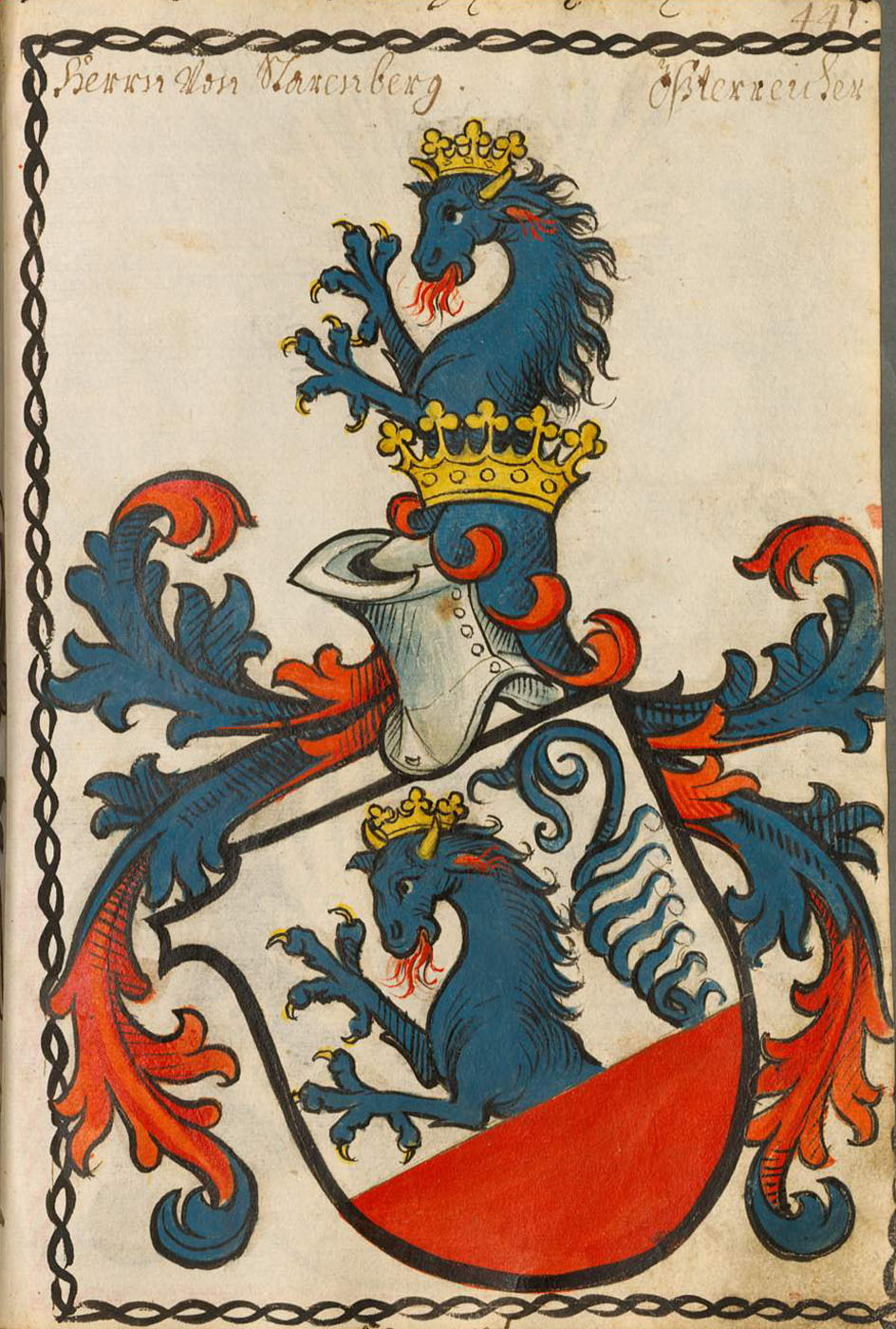 Scheibler'sches Wappenbuch , älterer Teil; Seite 441 Herrn von Starenberg Österreicher